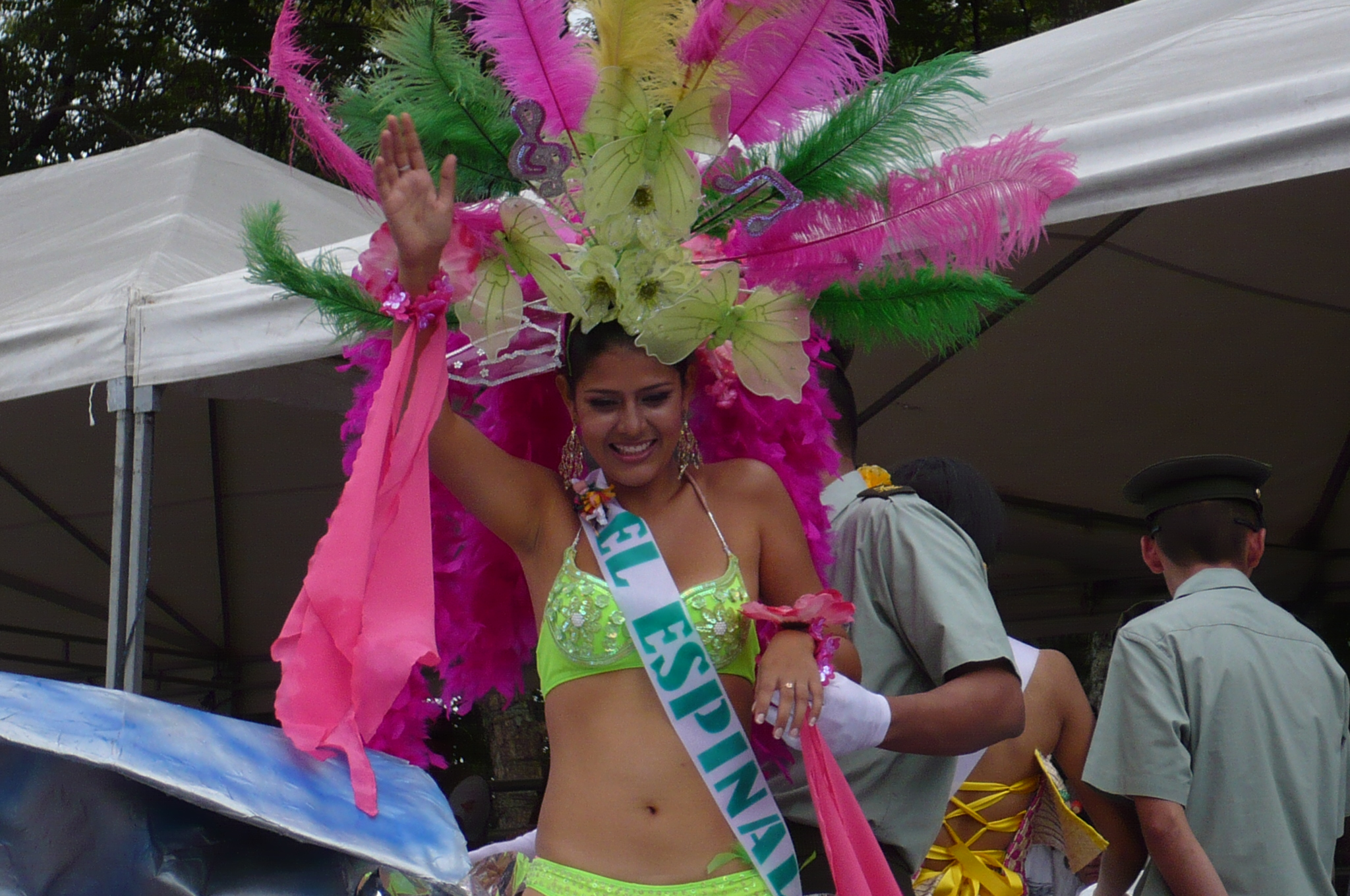 Reinado Departamental del Folclor. Fiestas del San Juan en Ibagué, Tolima. Desfile del 24 de junio